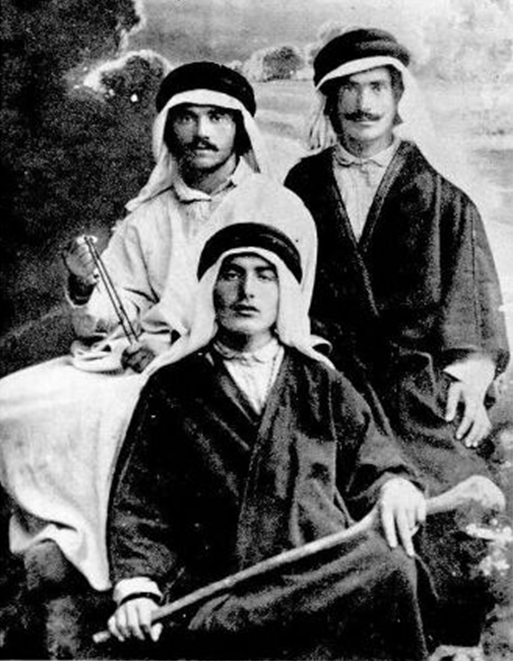 Haroe